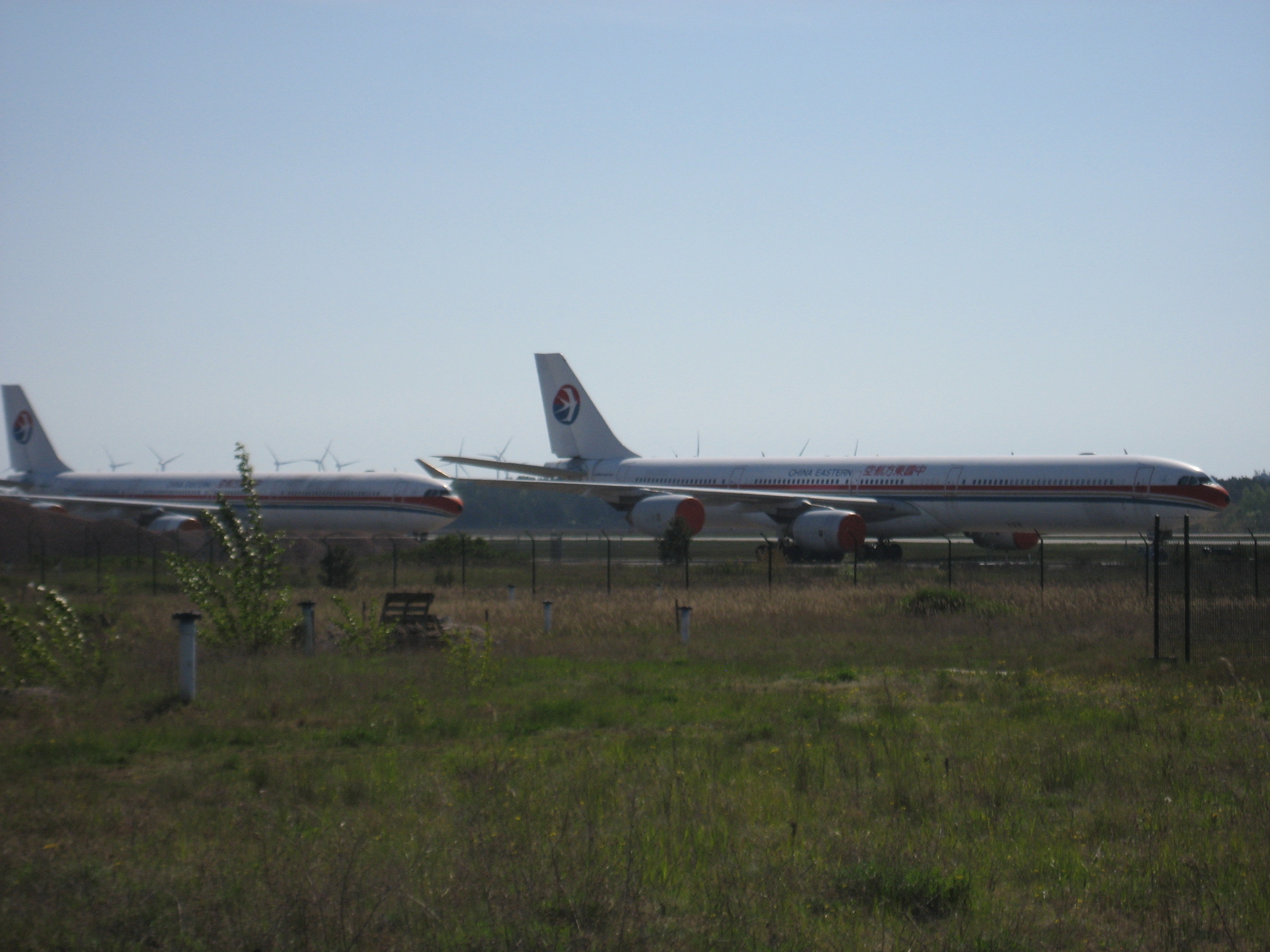 Flughafen Schwerin-Parchim: Flugzeuge auf der Rollbahn.